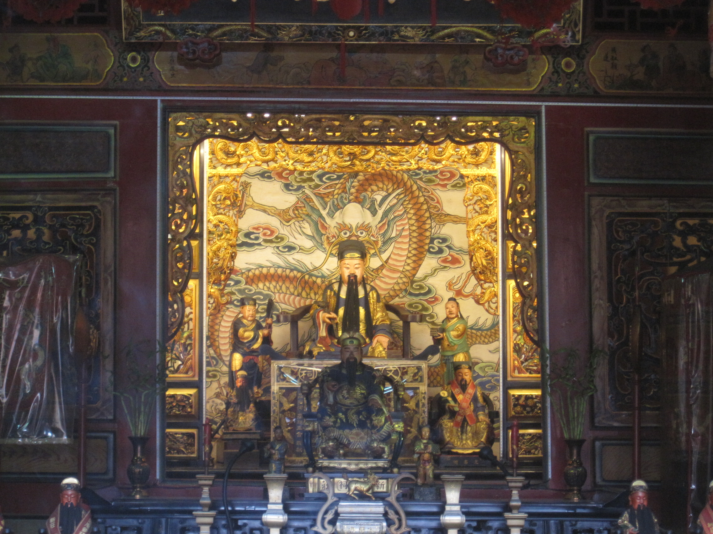 新莊文昌祠神龕